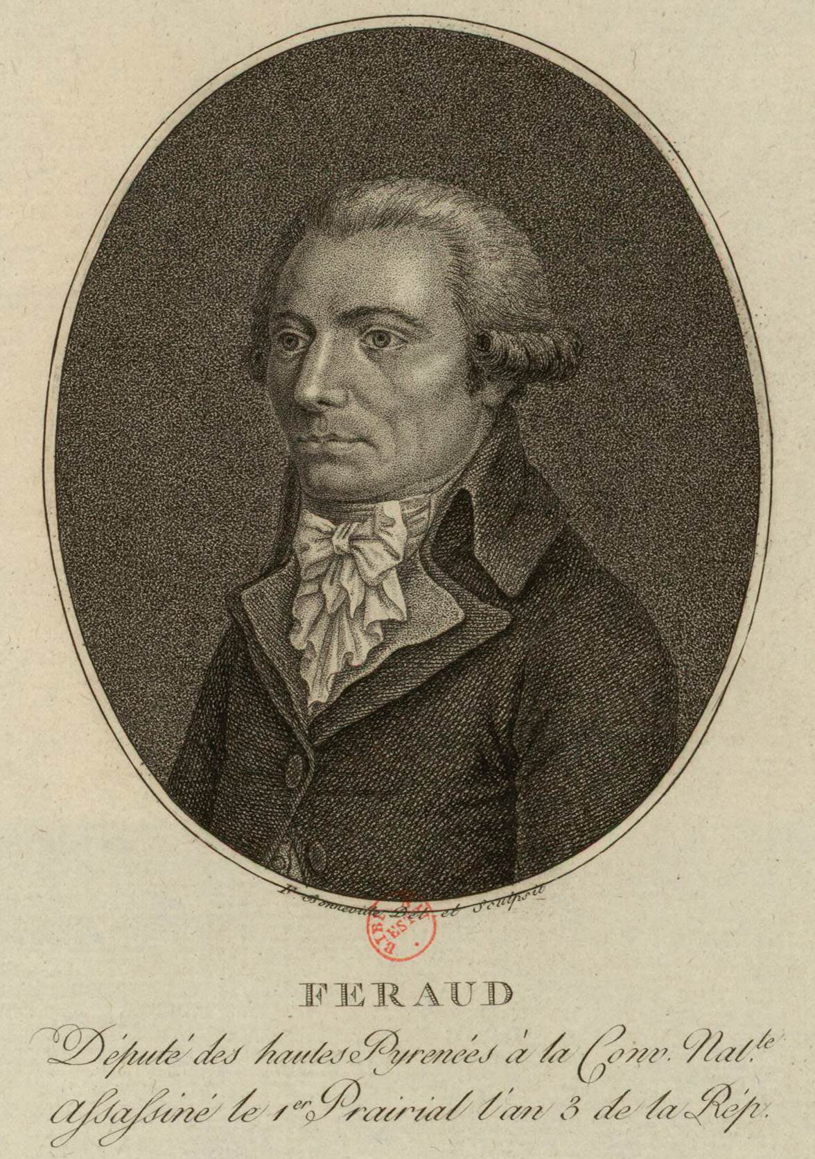 Féraud, député des Hautes-Pyrénées à la Convention nationale (estampe).